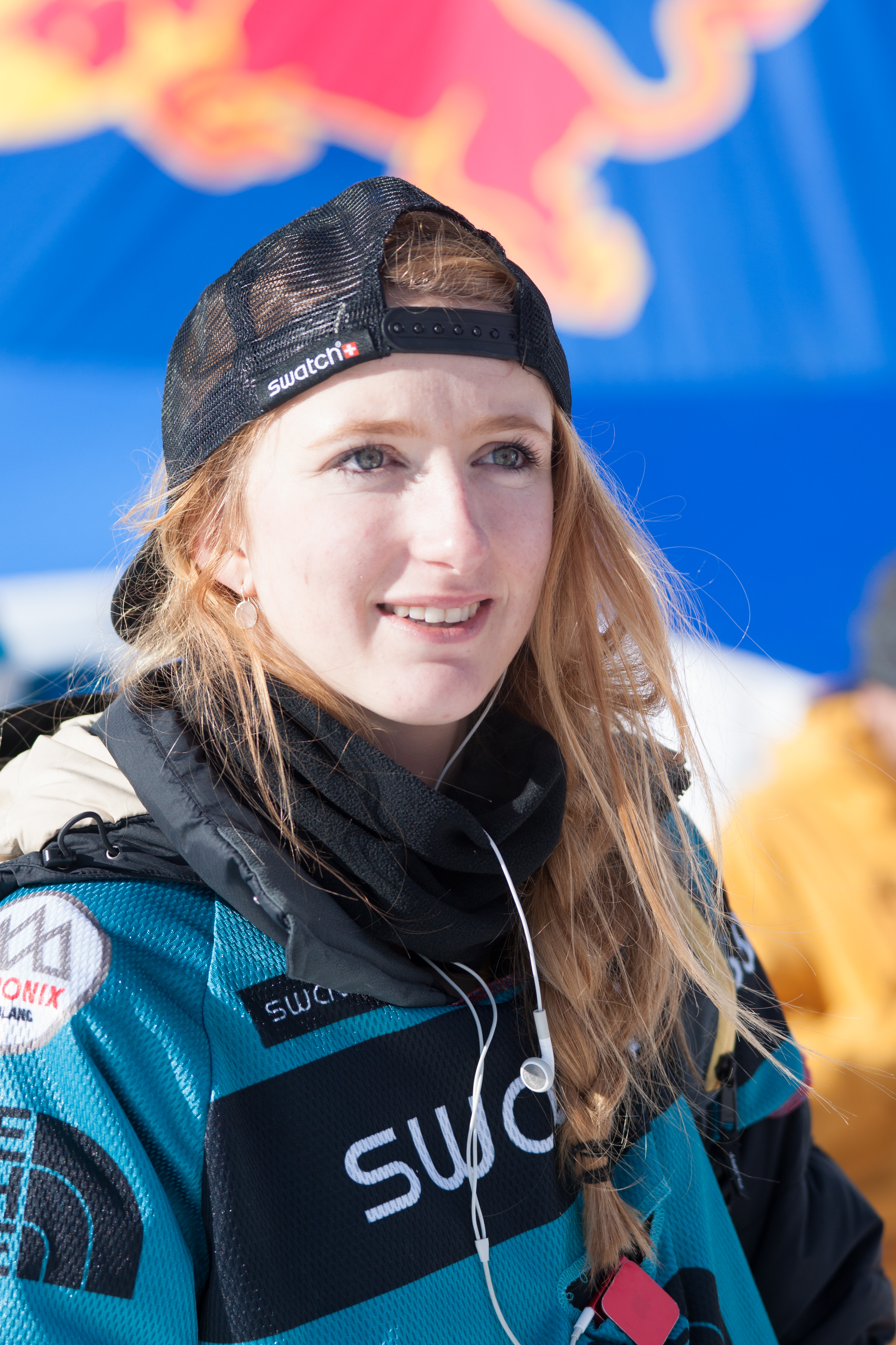 Freeride World Tour 2014 Chamonix - Estelle Balet